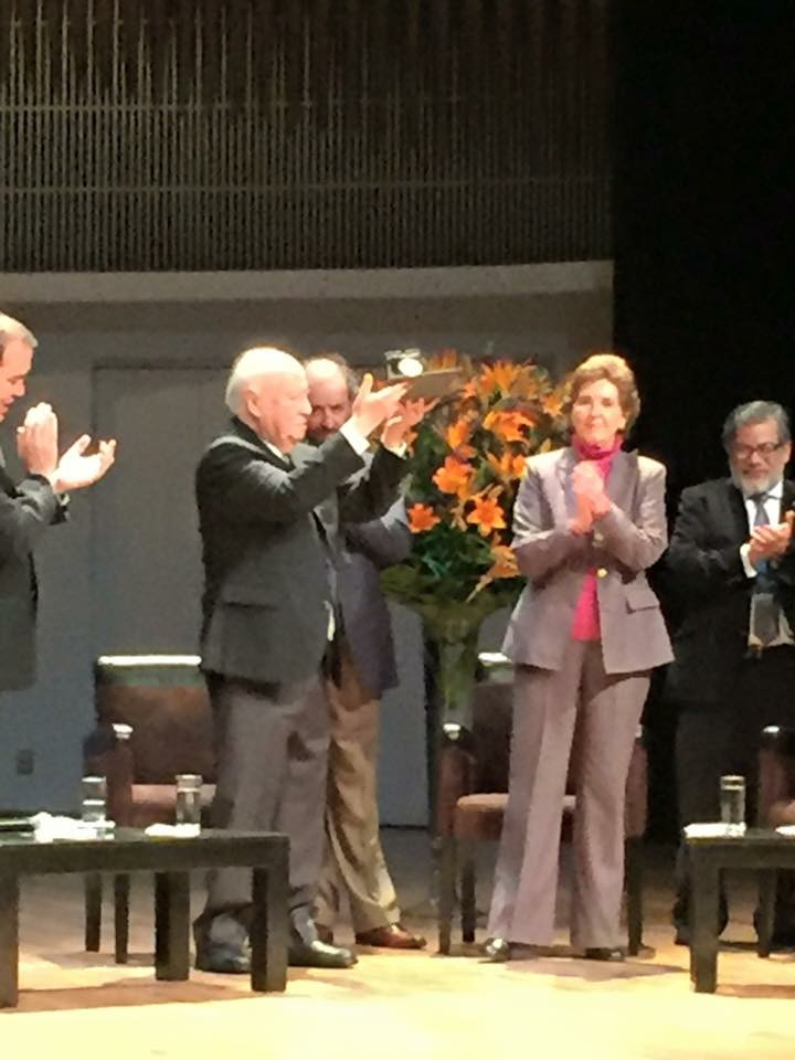 Entrega de la Medalla ¨Bellas Artes¨ a Francisco Savín